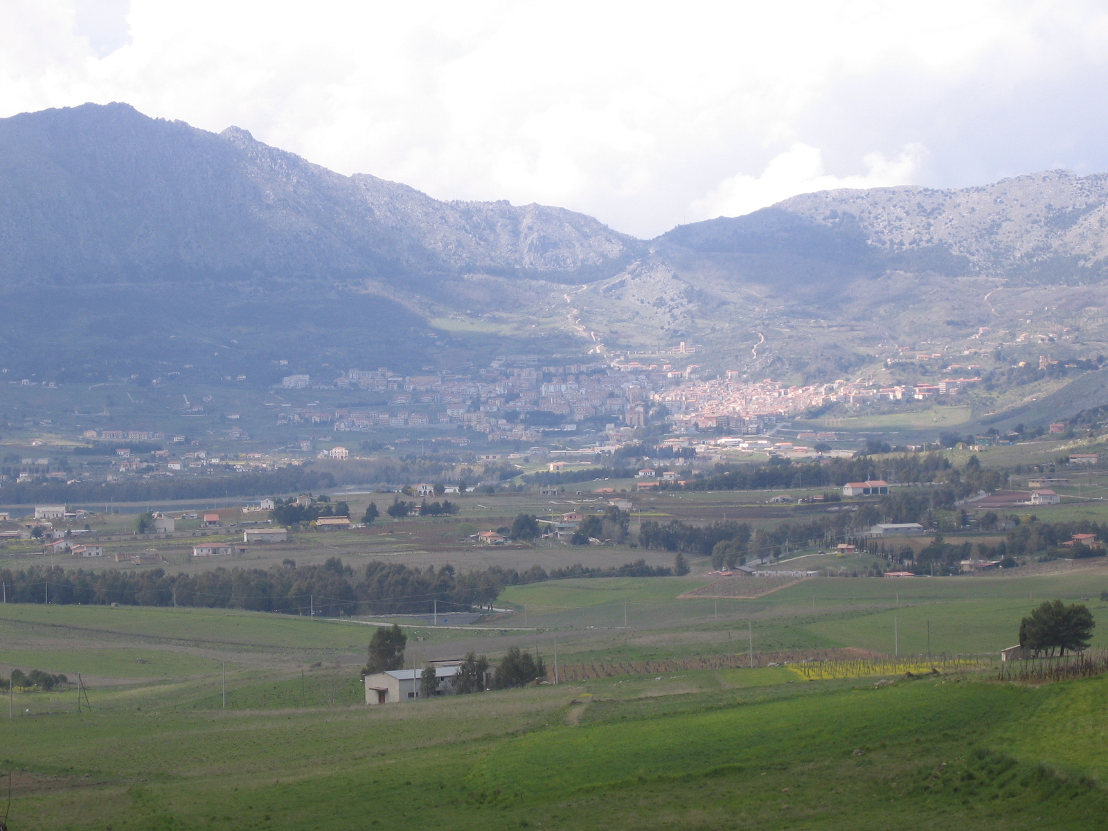 Hora e Arbëreshëvet - Piana degli Albanesi. Author: Martin Di Maggio. Own work